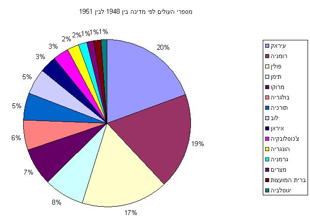 מספרי עולים לפי מדינה בין 1948 ל-1951.